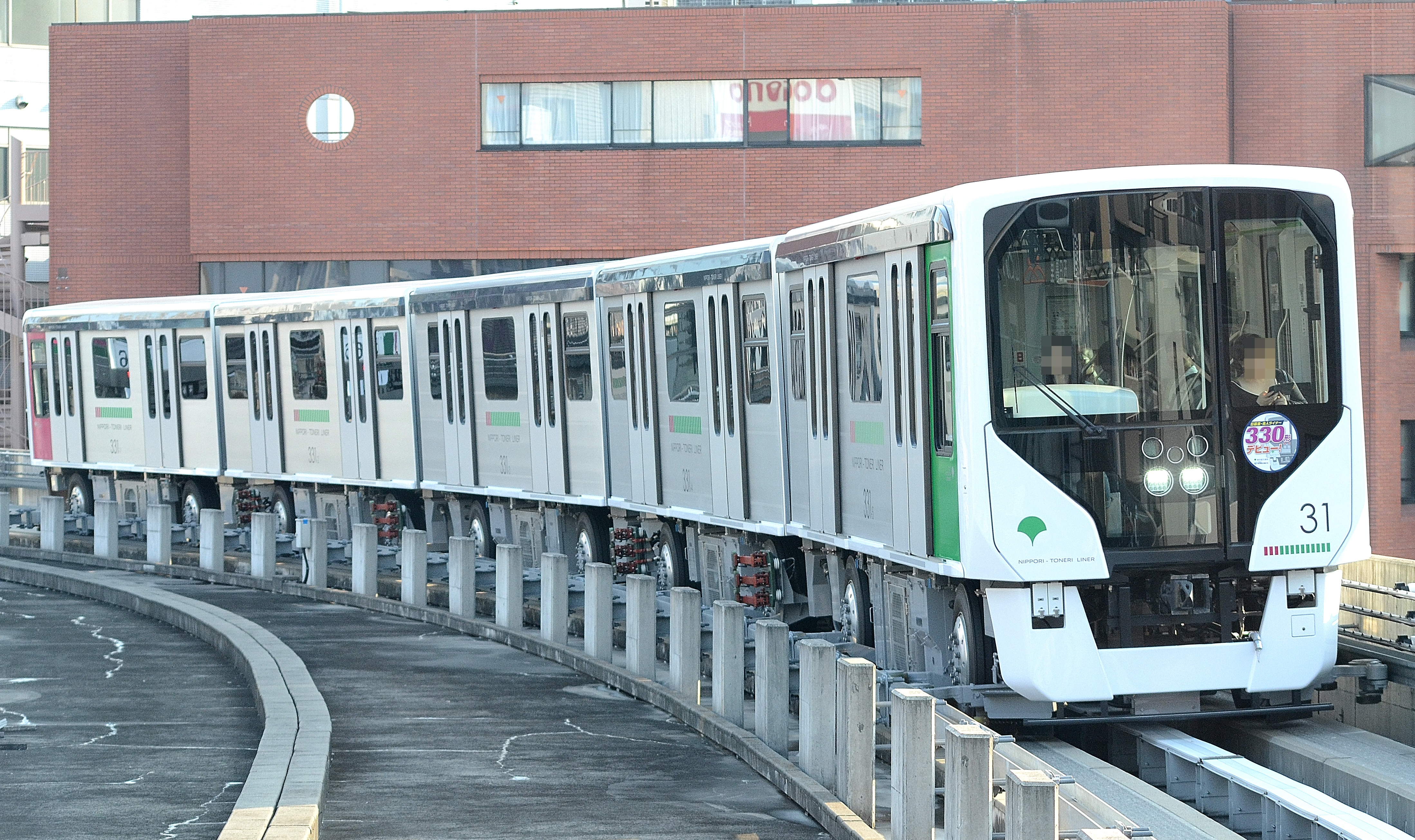 営業運転を開始した、日暮里・舎人ライナー用東京都交通局330形電車(西日暮里駅ホームから撮影）